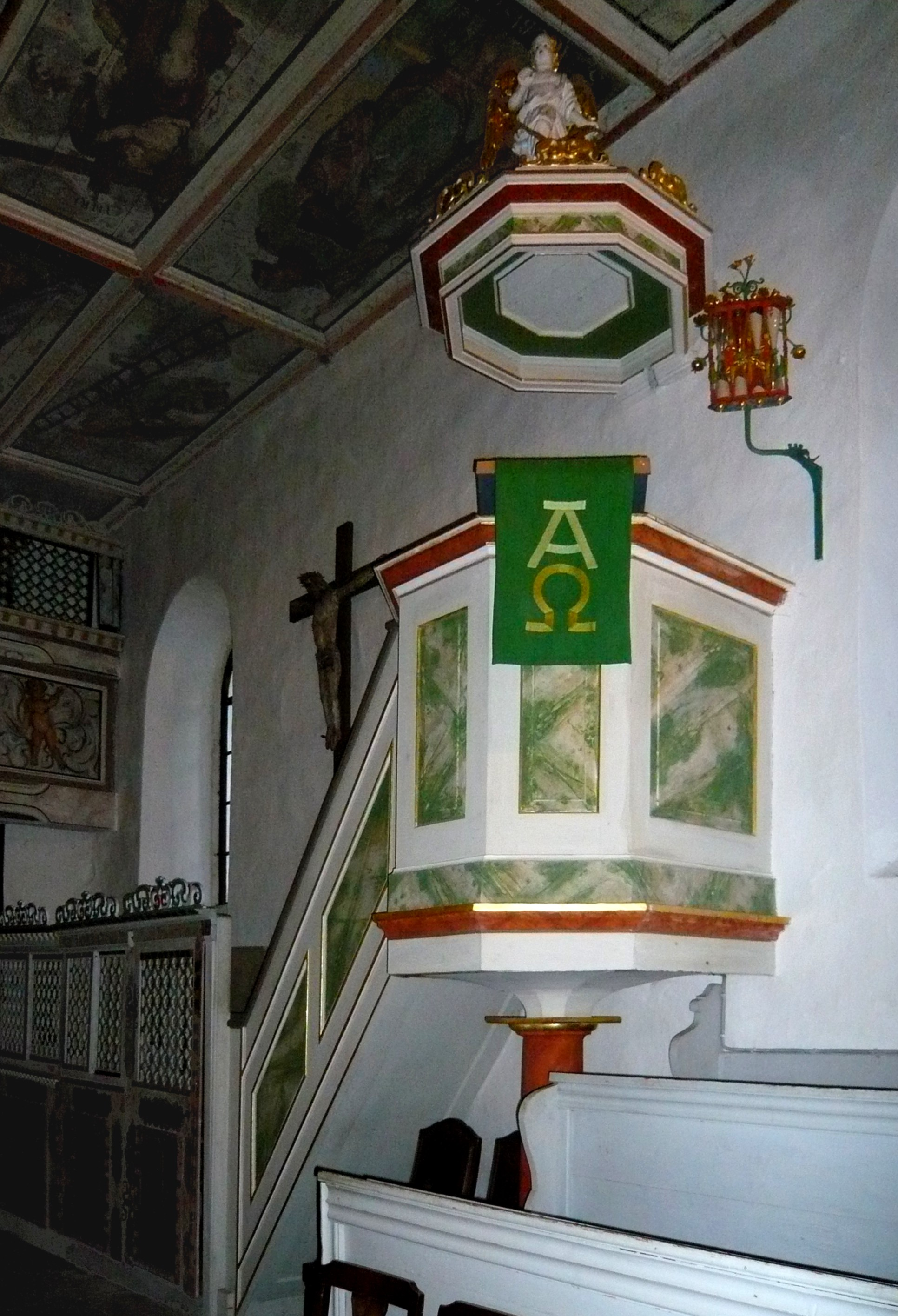 Dorfkirche Schellerhau, Kanzel